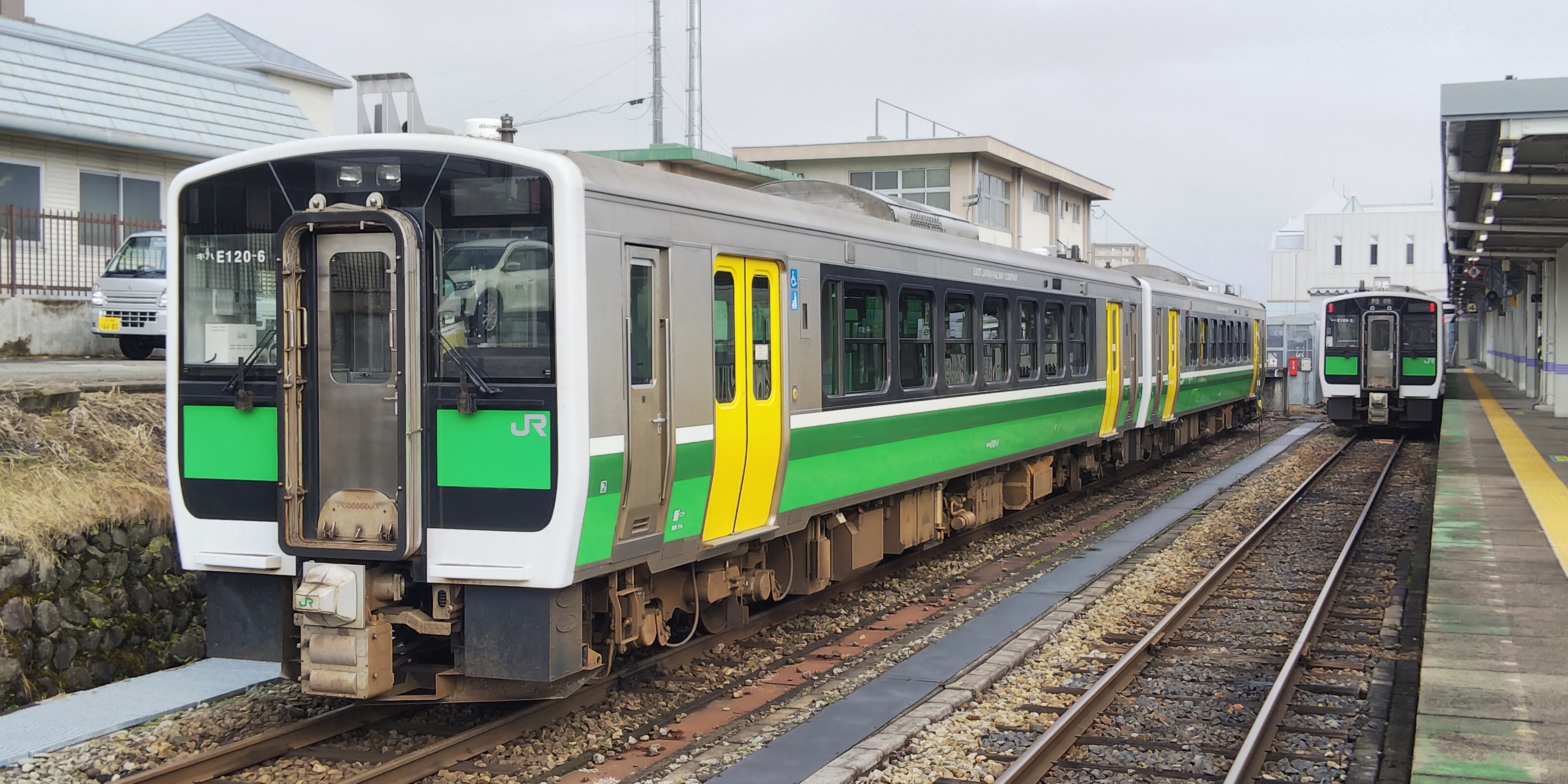 JR東日本キハE120形気動車 E120-3 東北色 米沢駅にて